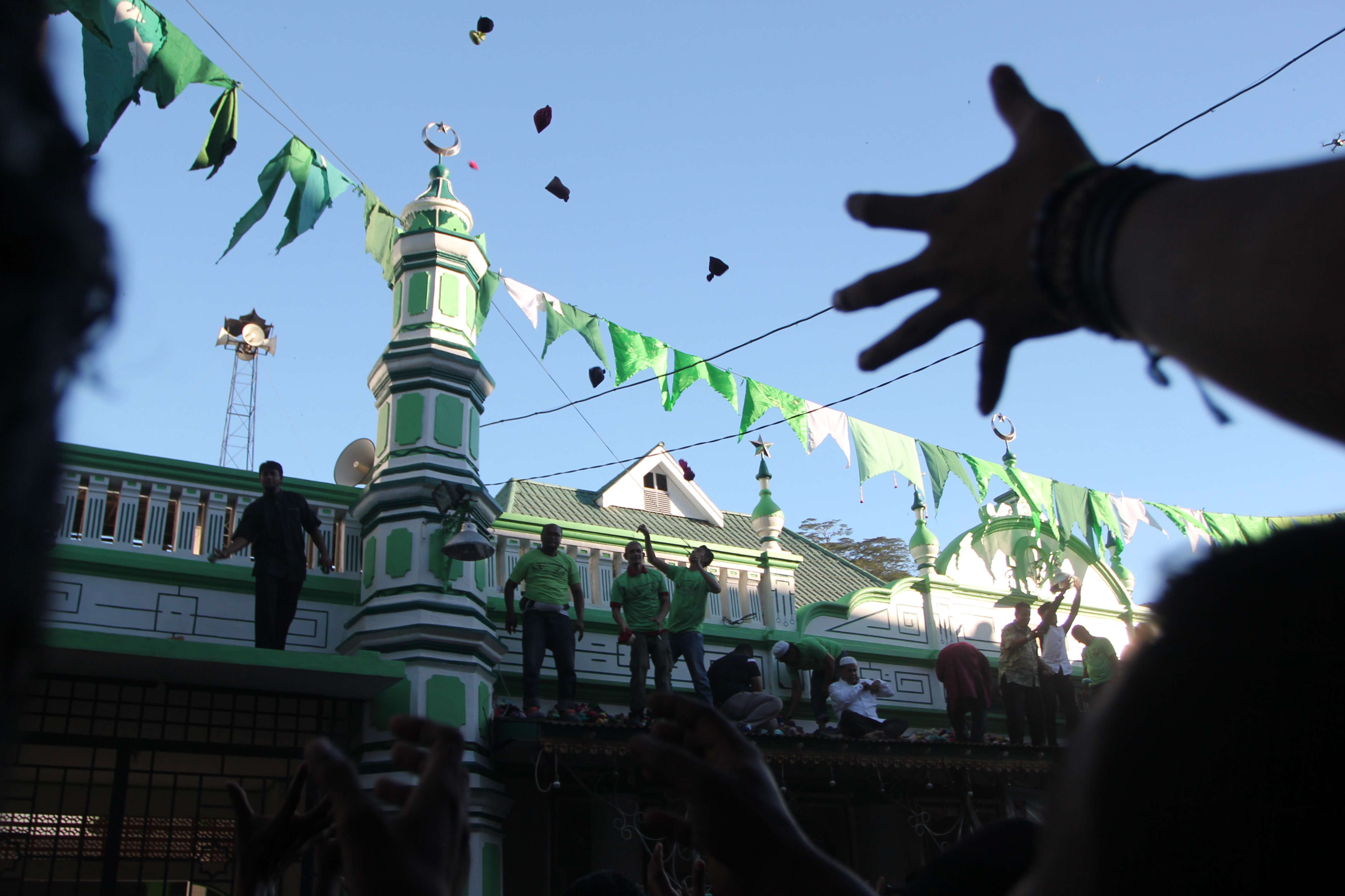 Serak Gulo